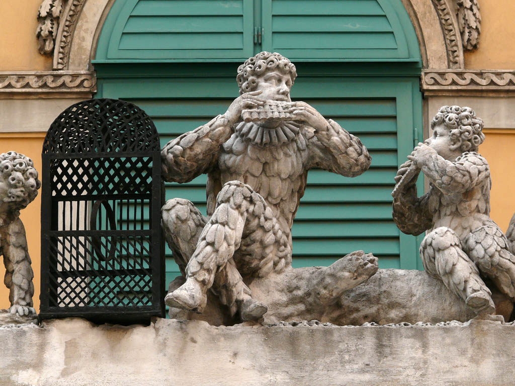 Papagenotor, detail